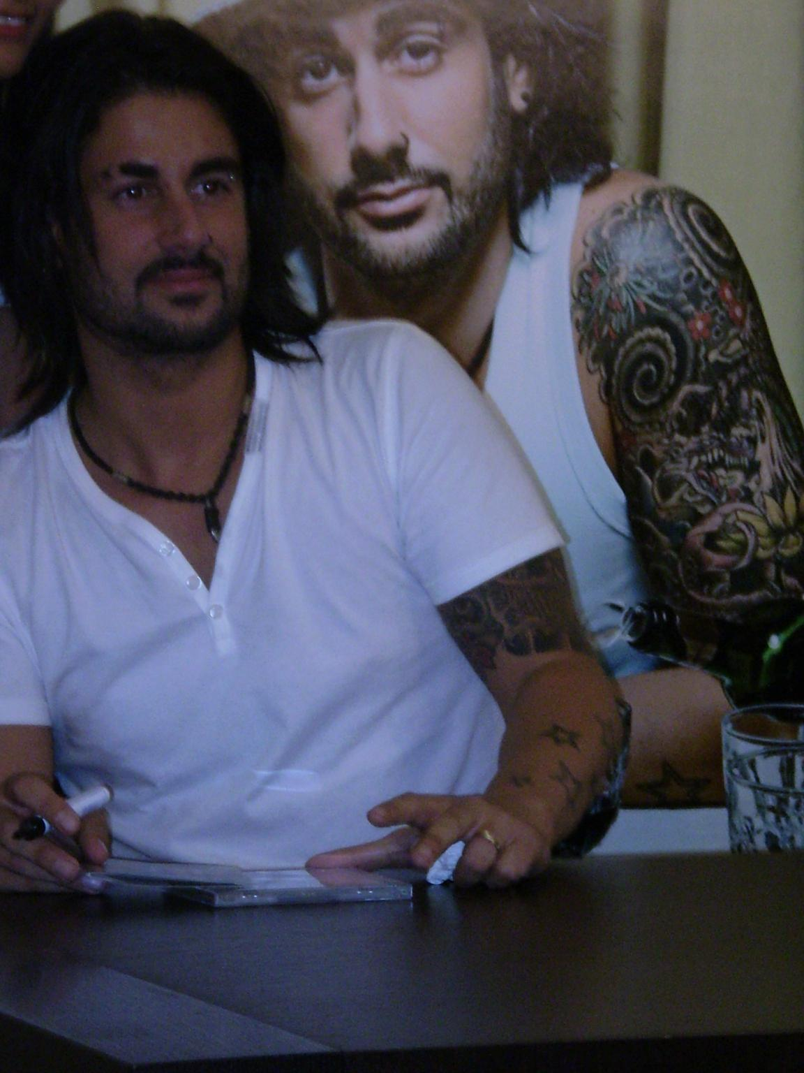 Ramón Melendi, cantante español; firma de discos en el Corte Inglés de Princesa, Madrid, España.